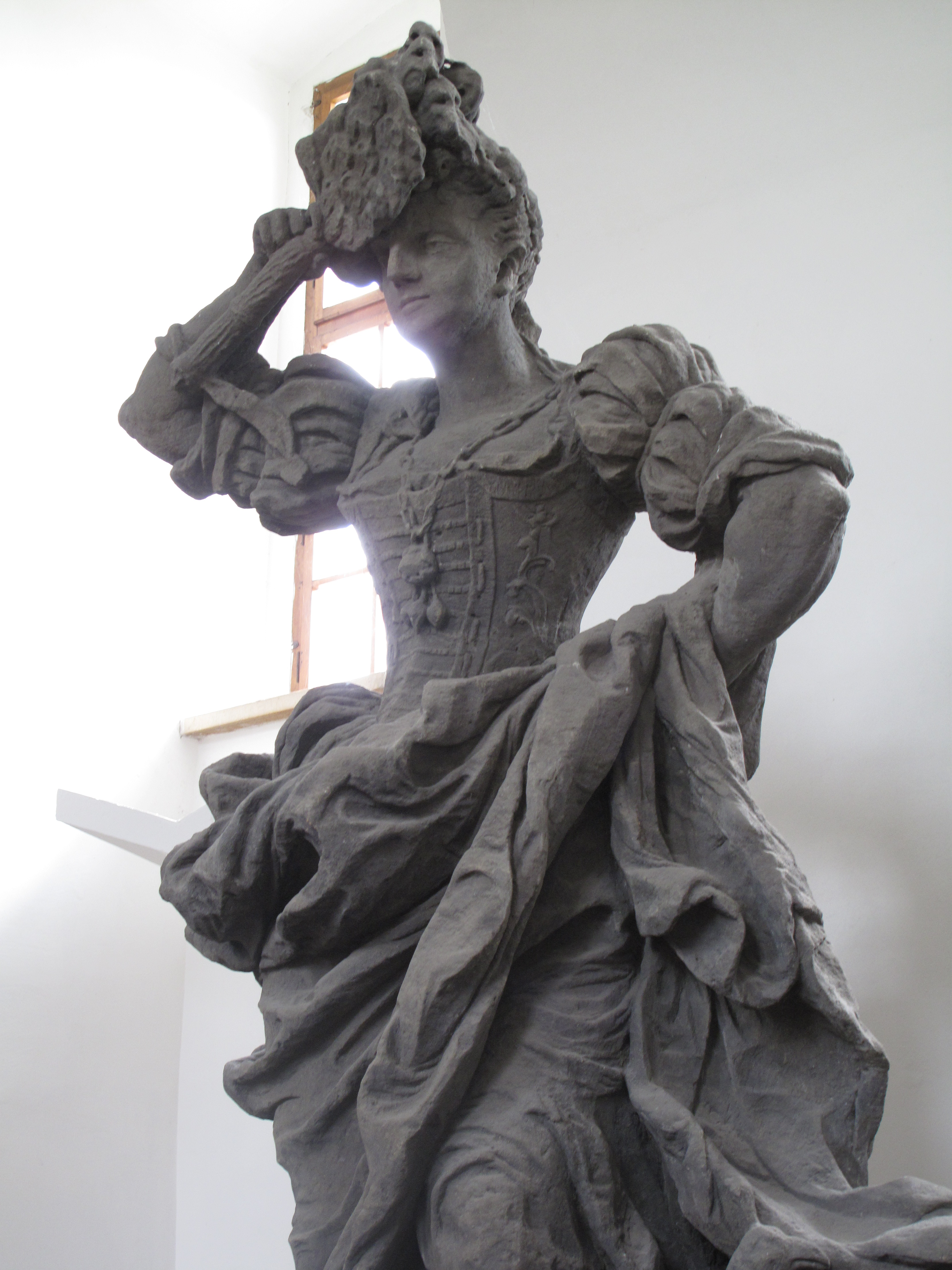 Matyáš Bernard Braun, Pýcha (Neřesti) - originál lapidárium Kuks